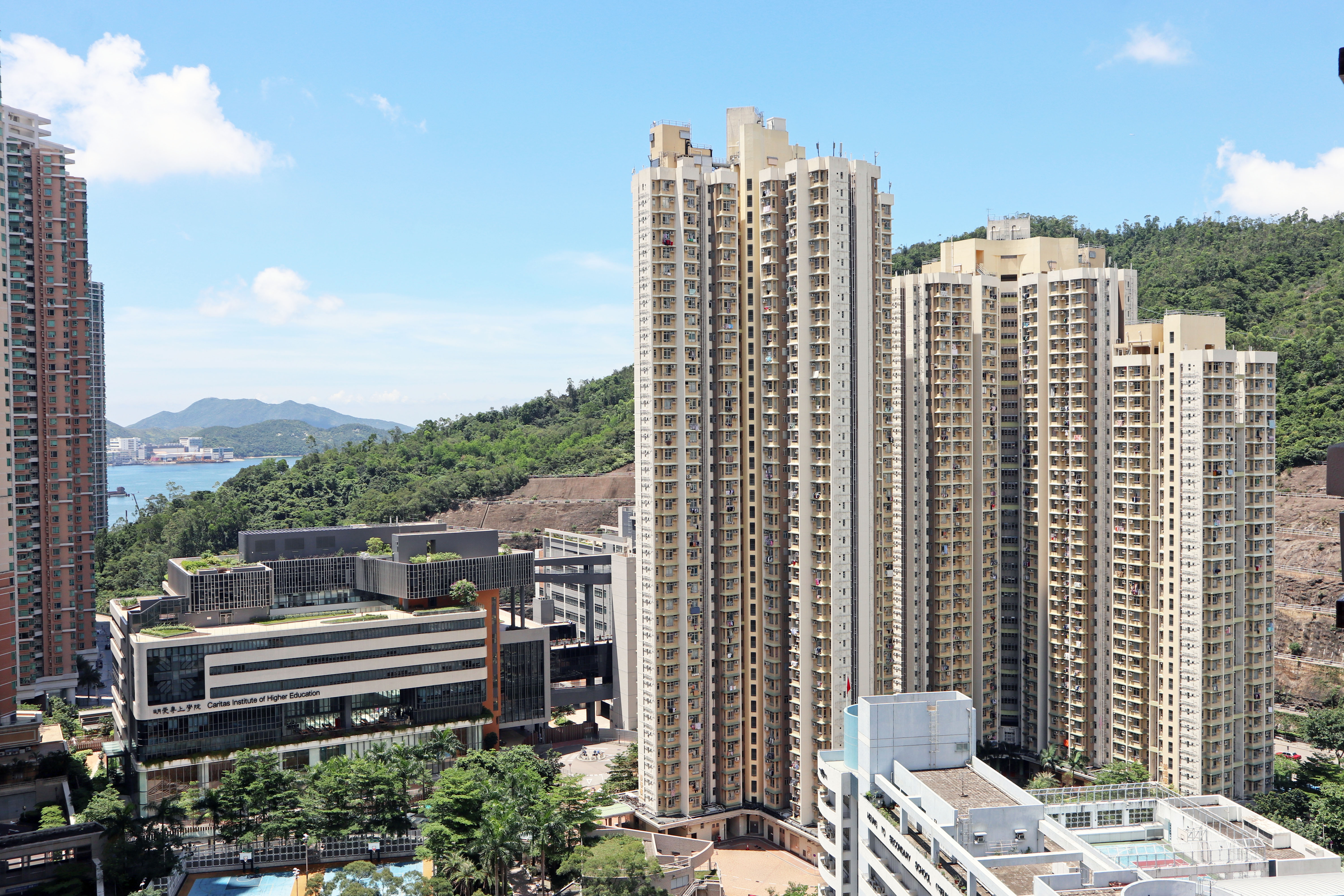 調景嶺善明邨及明愛專上學院外觀